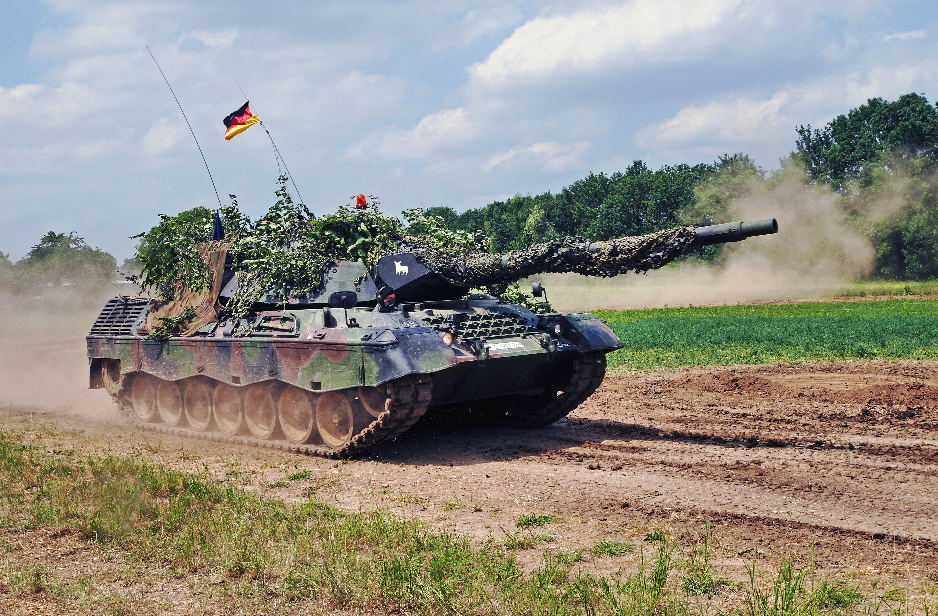 Ein Leopard 1A5 in Fahrt beim Militärtag 2015 in Uffenheim. Der Leopard 1A5 stellt eine Kampfwertsteigerung von 1339 Leopards aus den Baulosen 1 bis 4 dar, die von Oktober 1986 bis September 1992 umgebaut worden sind.